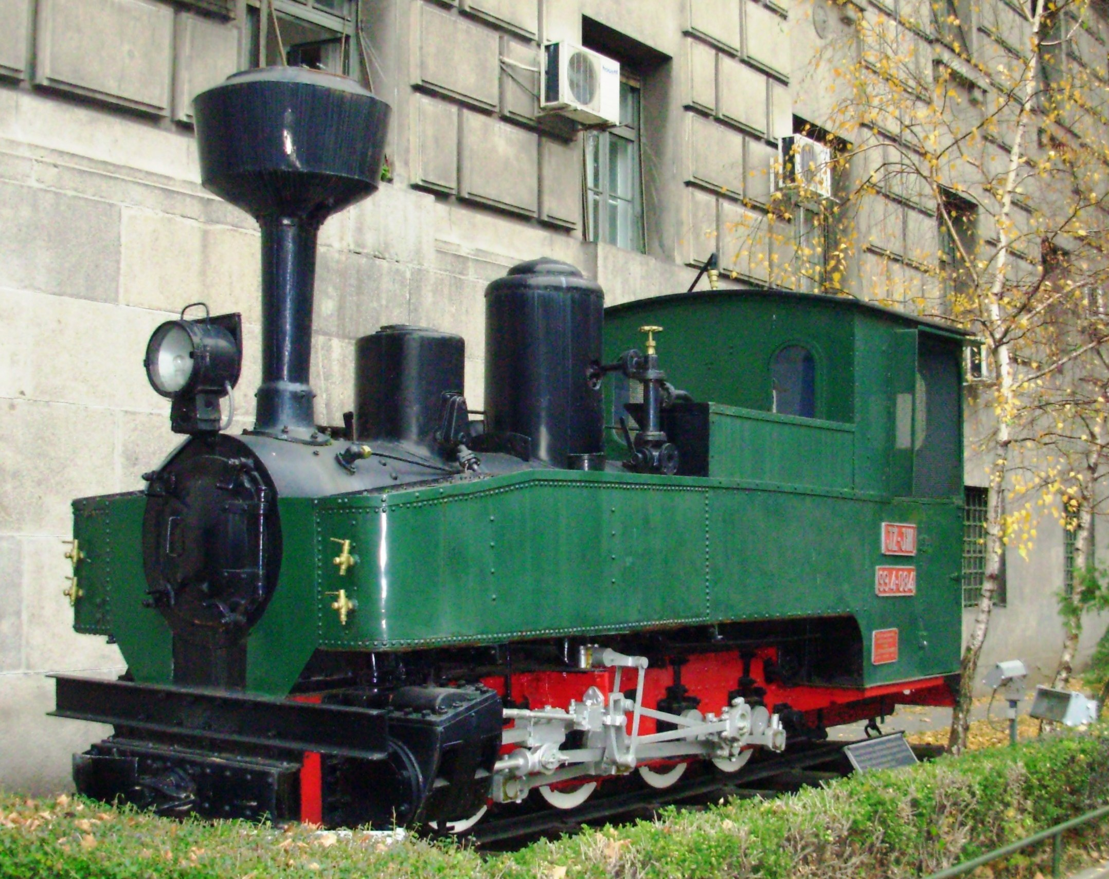 Tenderska lokomotiva iz 1917. Nalazi se ispred železničkog muzeja u Beogradu. Slikao Goldfinger